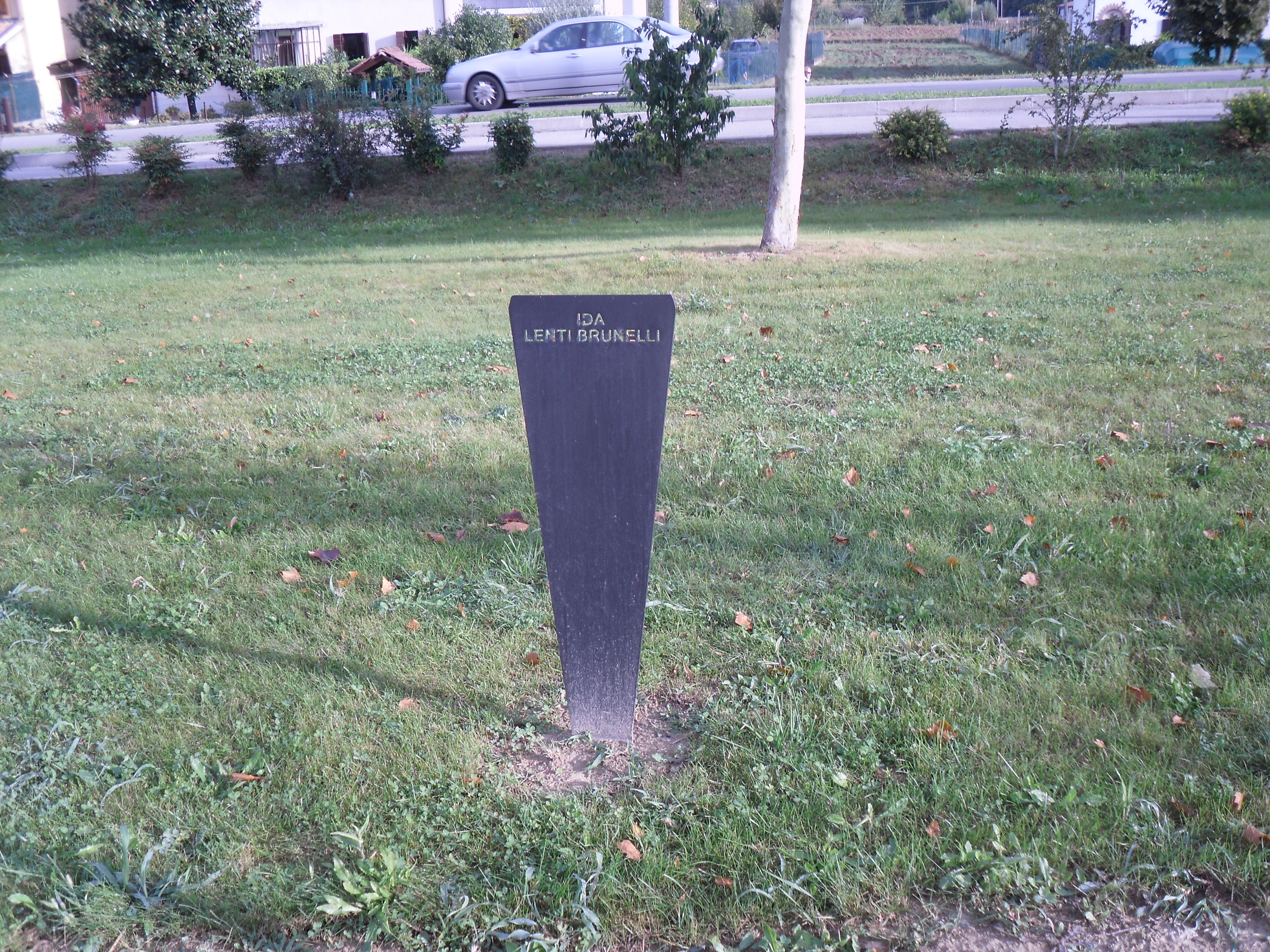 Giardino dei Giusti del Mondo di Padova. Stele dedicata a Ida Lenti Brunelli.